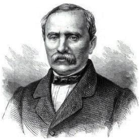 "Le docteur Clot-Bey".